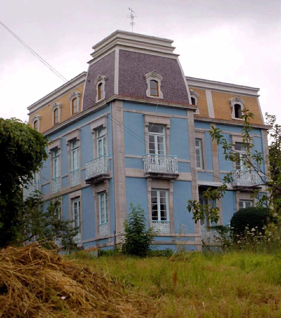 Grado (Asturias) - Palacete El Calabión